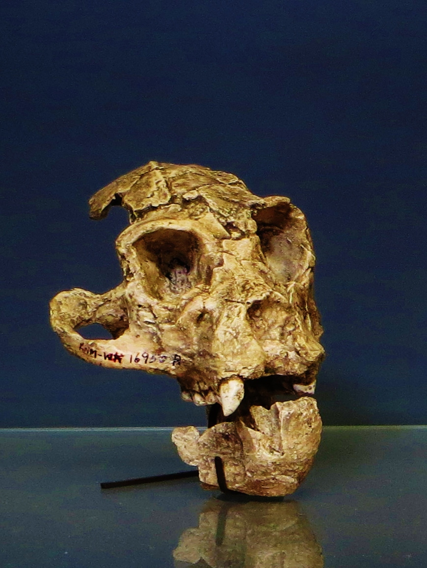 Fossil of Turkanapithecus, an extinct mammal - Took the photo at Musee d'Histoire Naturelle, Paris